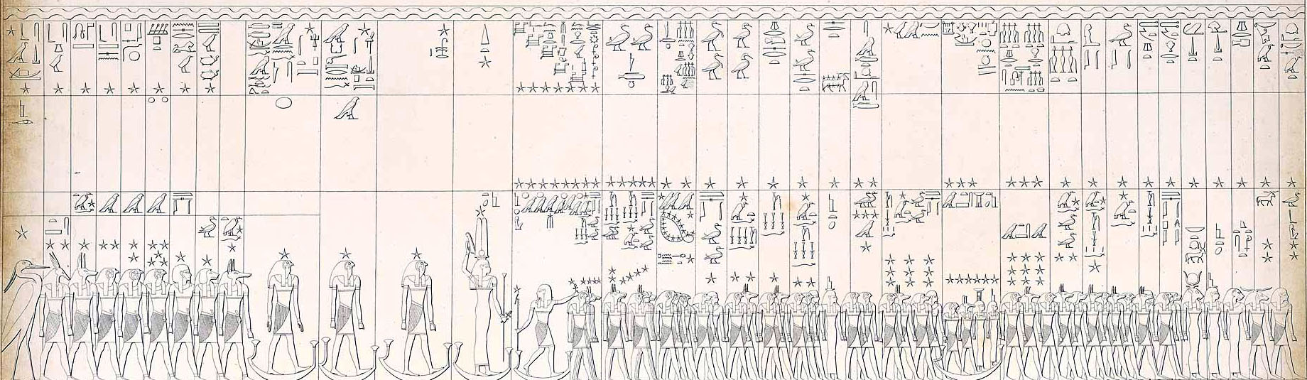 Partie du plafond de la tombe de Séthi Ier